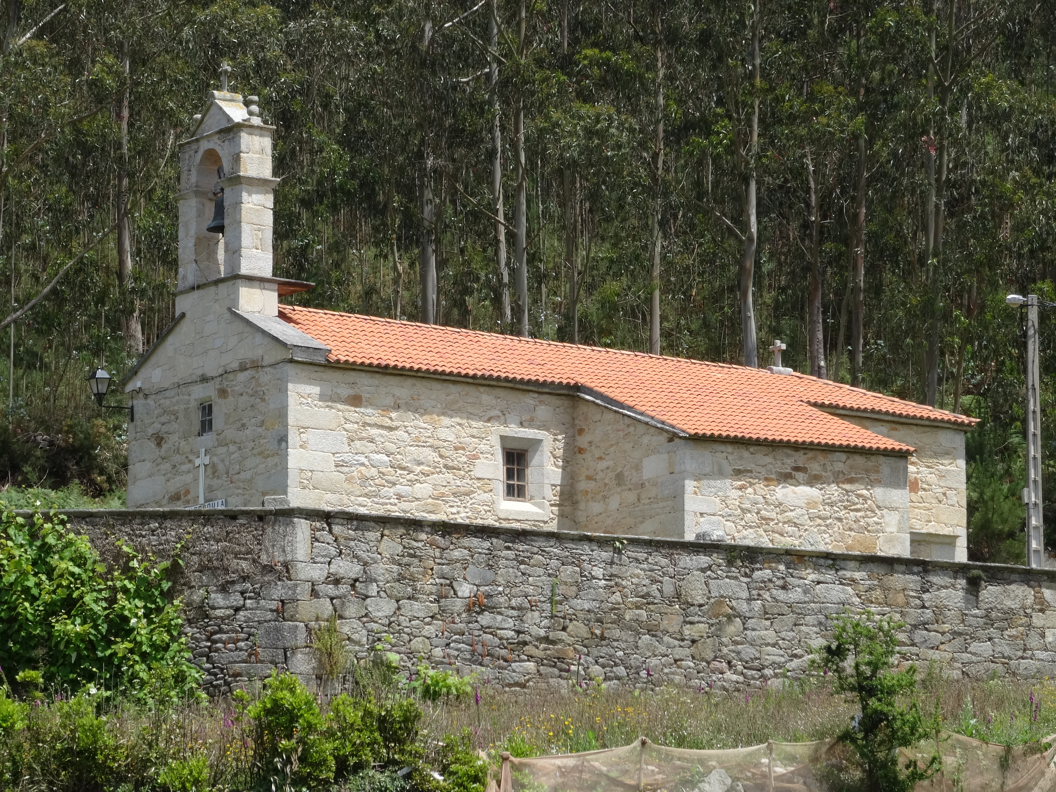 Igrexa de Niñóns, Ponteceso.